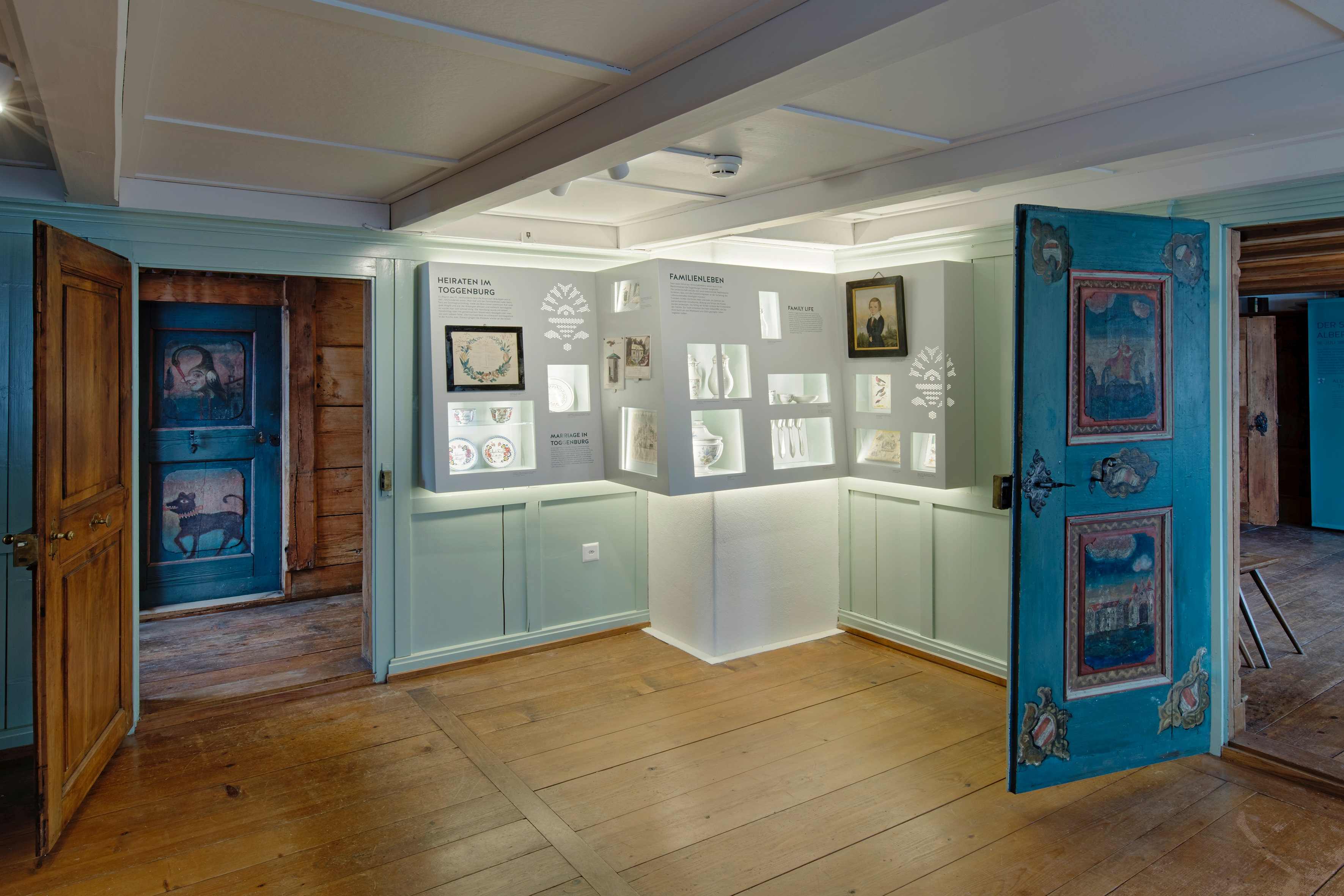 Trotz moderner Technik integriert sich die 2015 neu konzipierte Ausstellung gut ins alte Haus.